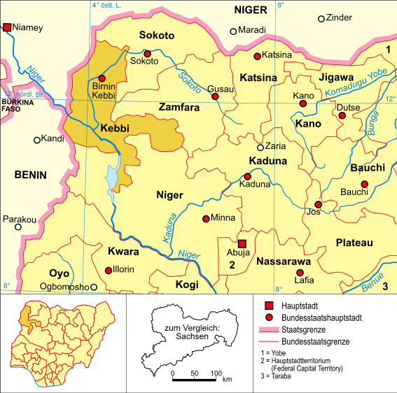 politische Karte Nigerias (Bundesstaat Kebbi hervorgehoben)